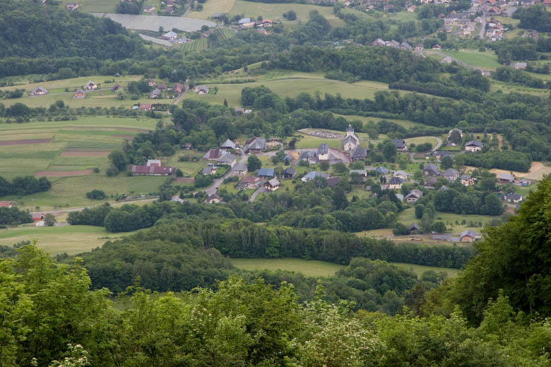 Vue sur le Chef-Lieu